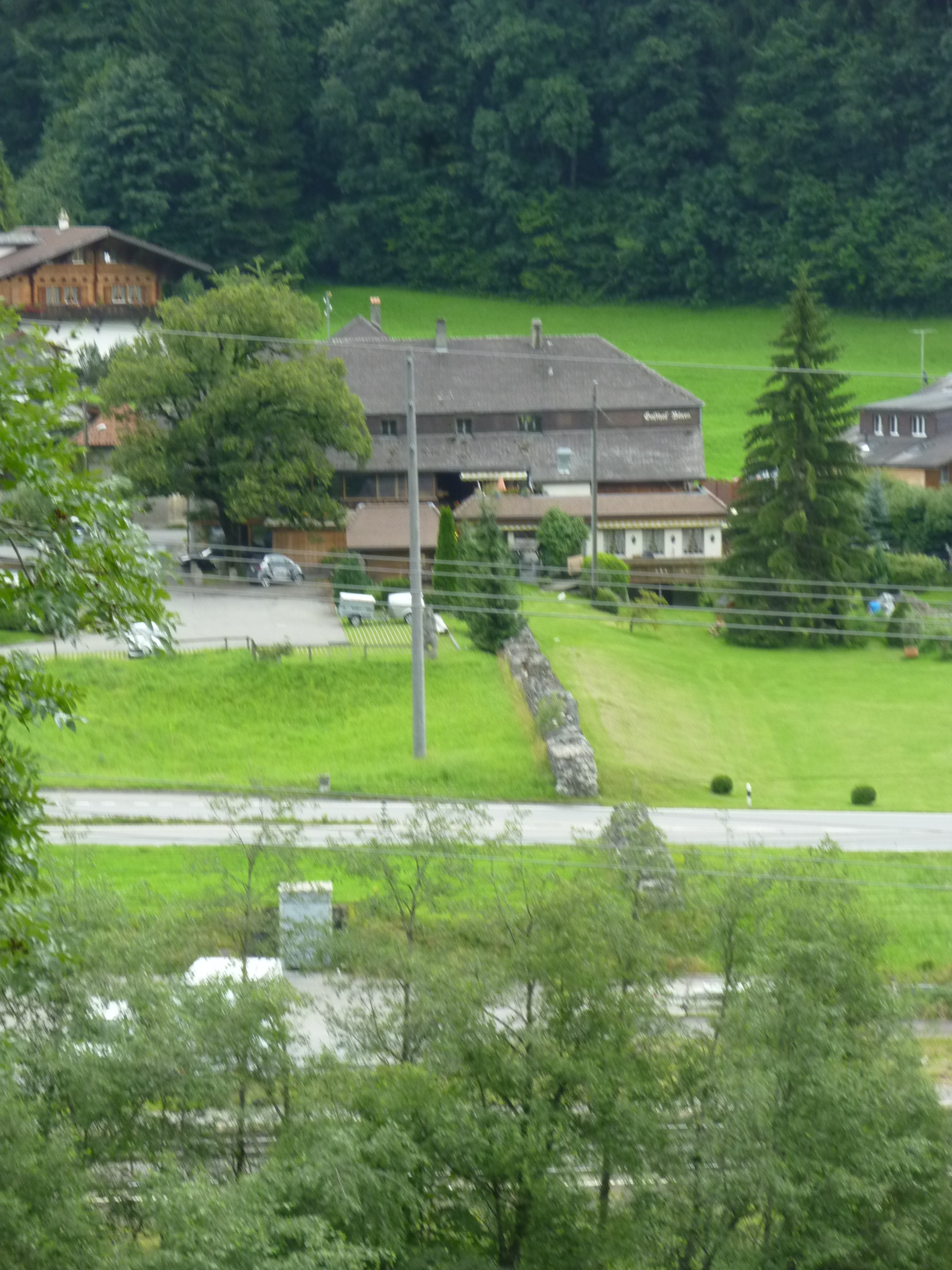 Mittelalterliche Letzi